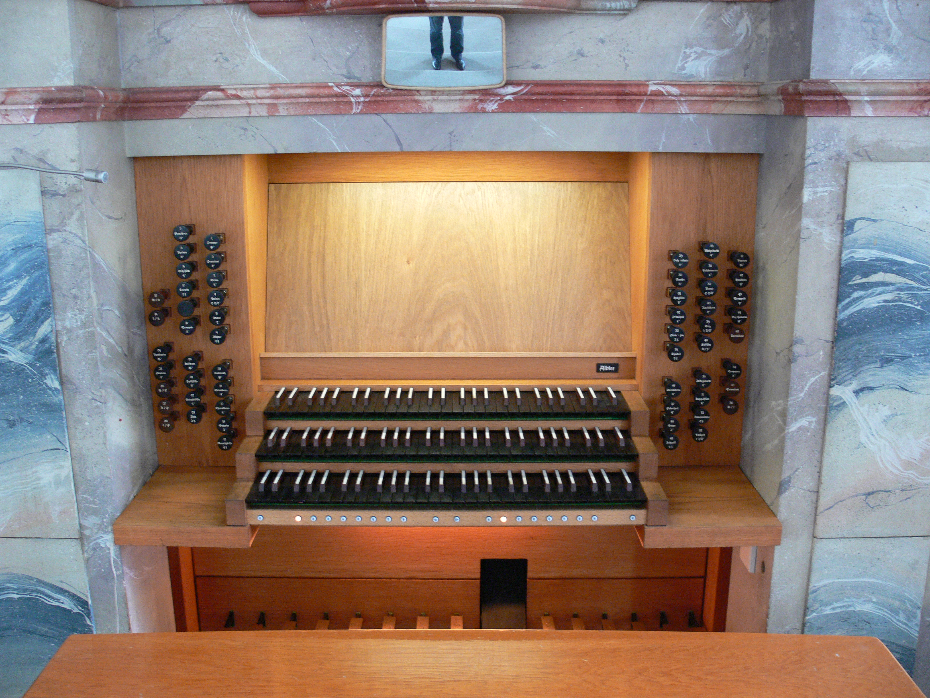 Pfarrkirche St. Martin, Langenargen, Bodenseekreis Orgel von Winfried Albiez, Lindau, 1977-1978